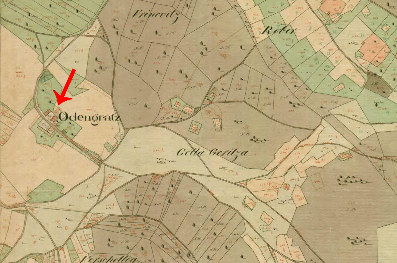 Franciscejski kataster za Kranjsko, 1823-1869